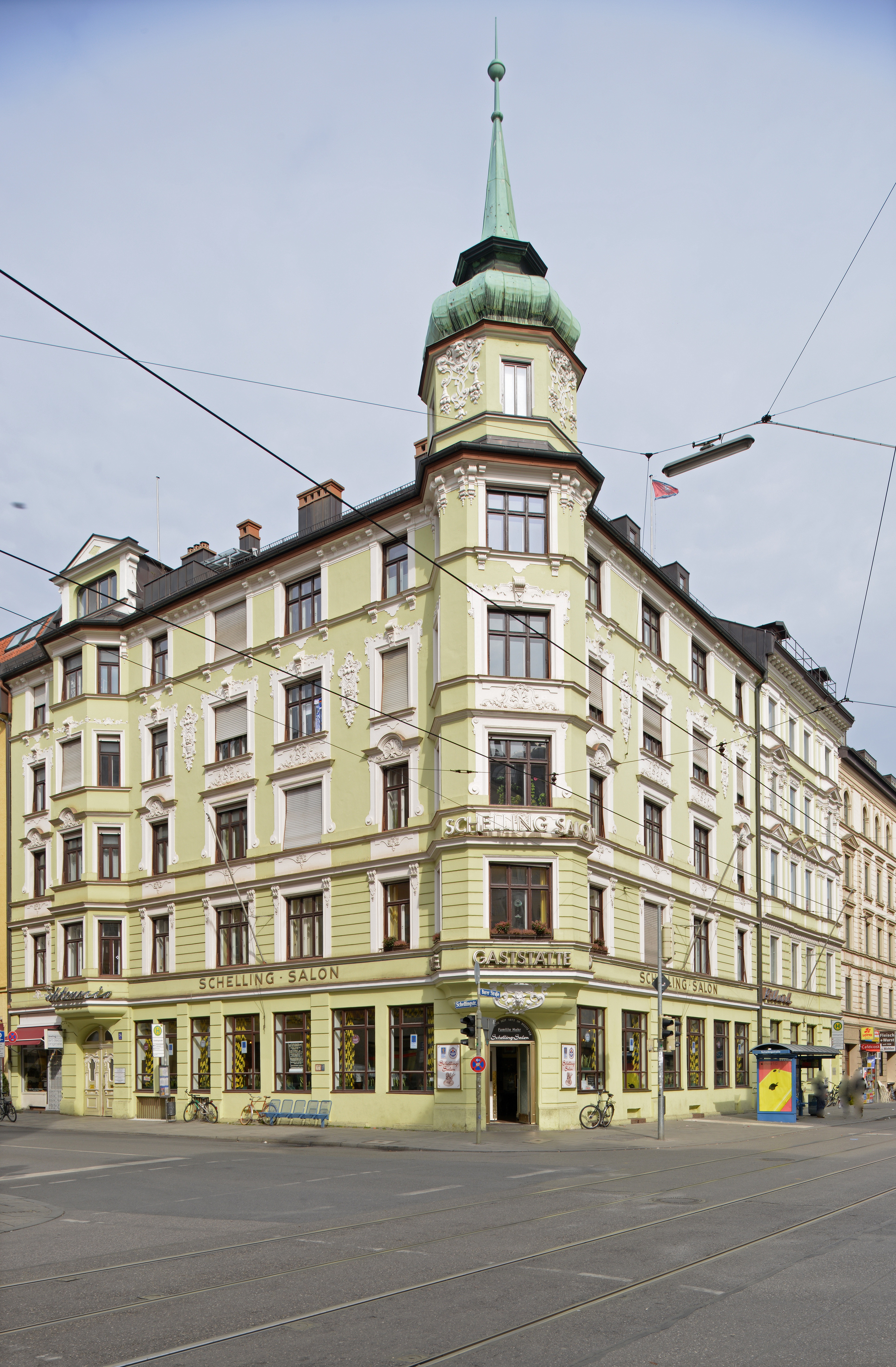 München, Fassadenansicht Schellingstraße 54, Ecke Barerstraße, der Schellingsalon. Höhenfestnetz Schlagbolzennummer aus dem Jahr 1928 Nr.308 am Fundament, Höhe über normal null 513,734 m.